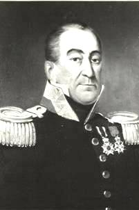 Abraham de Veer (1767-1838)